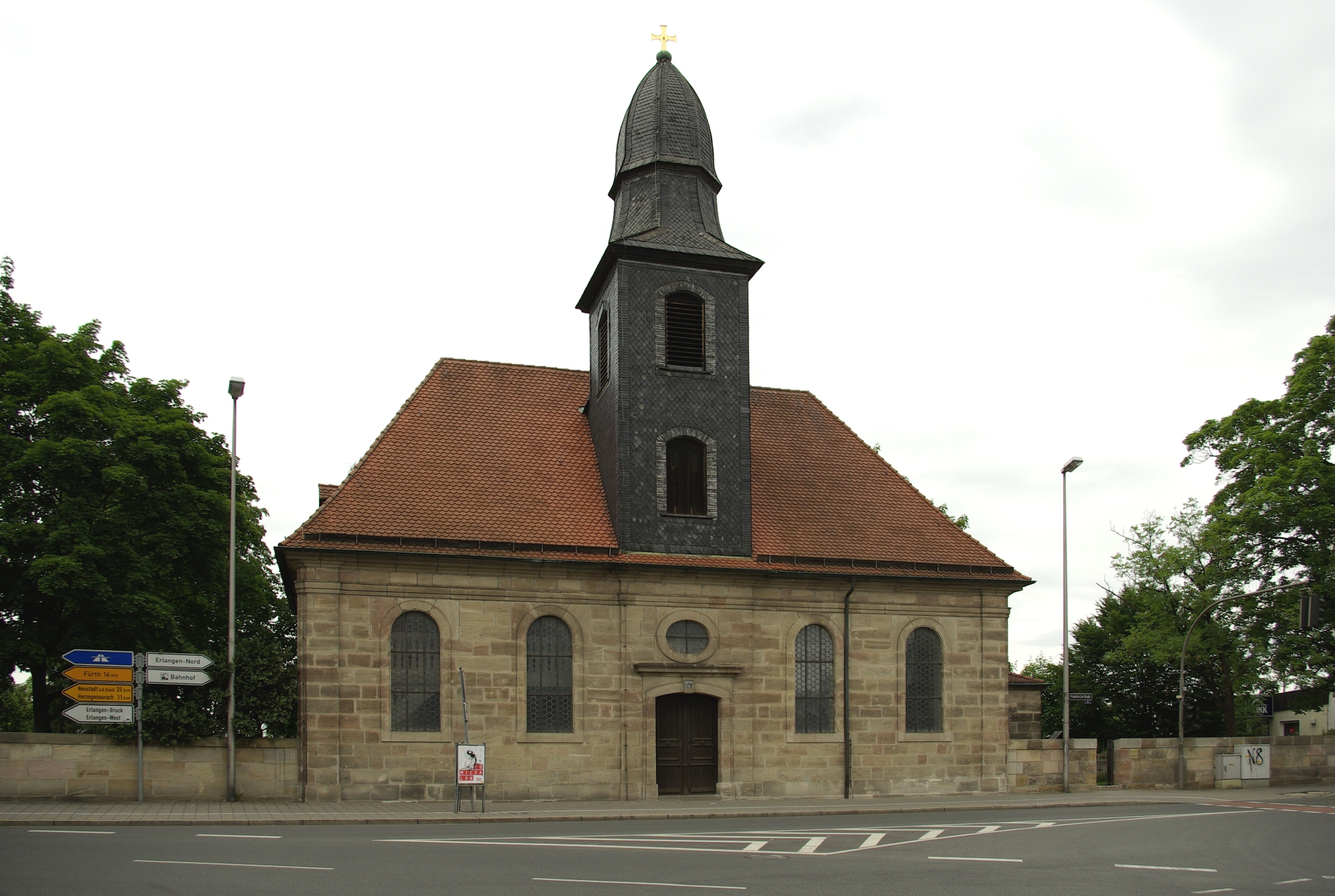 Die Neustädter Friedhofskirche auf dem Neustädter Friedhof in Erlangen